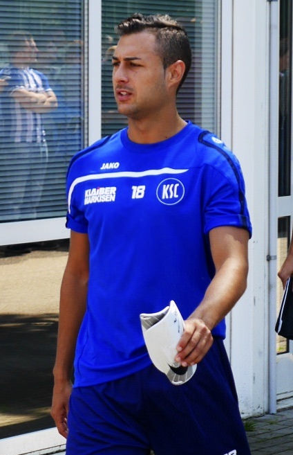 Trainingsauftakt beim KSC